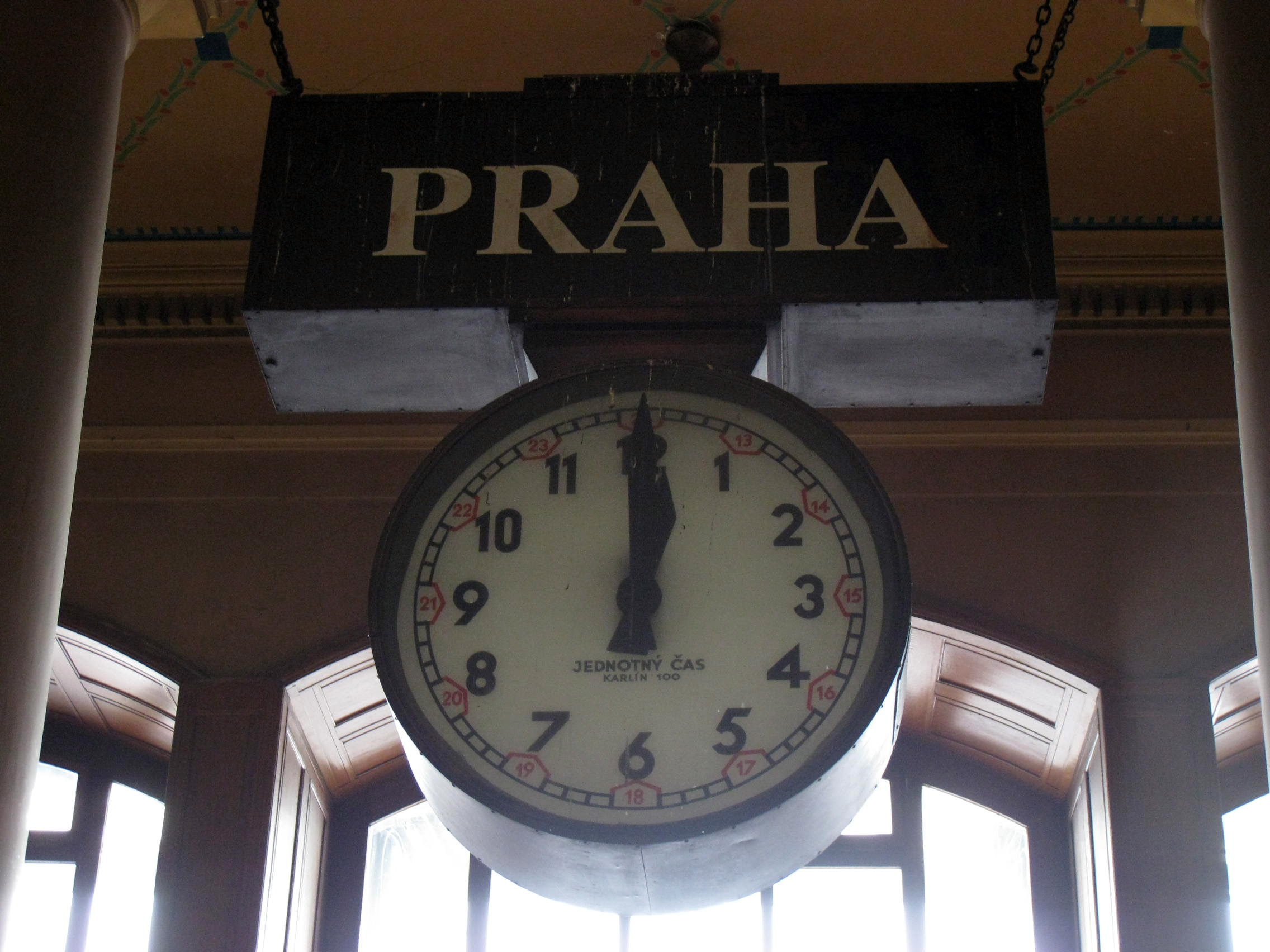 Hlavní nádraží, Praha 2-Vinohrady, Wilsonova 300/8